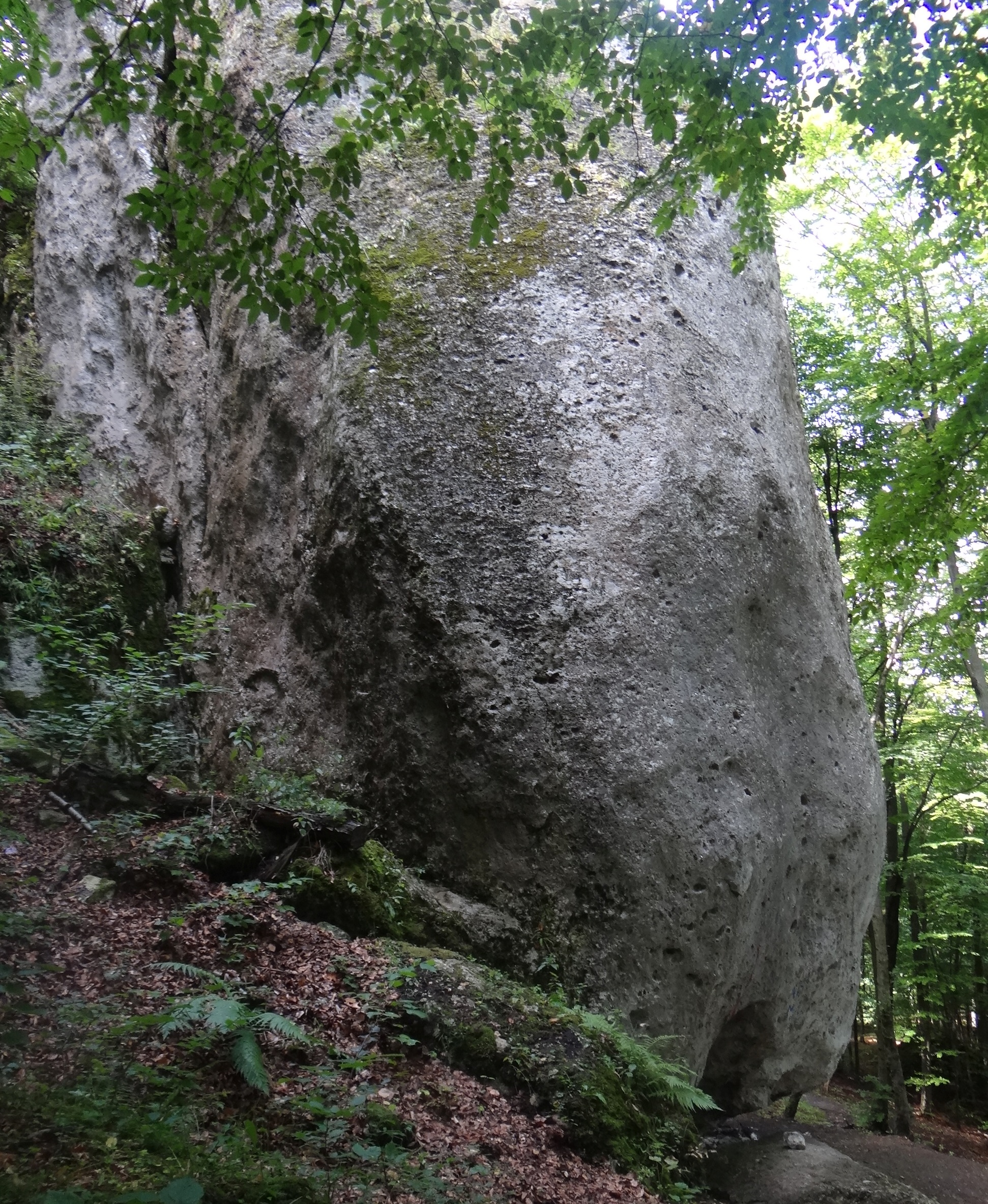 Wysoki Okap. Skała na wzgórzu Jastrzębnik w grupie Skał Kroczyckich na Wyżynie Częstochowskiej